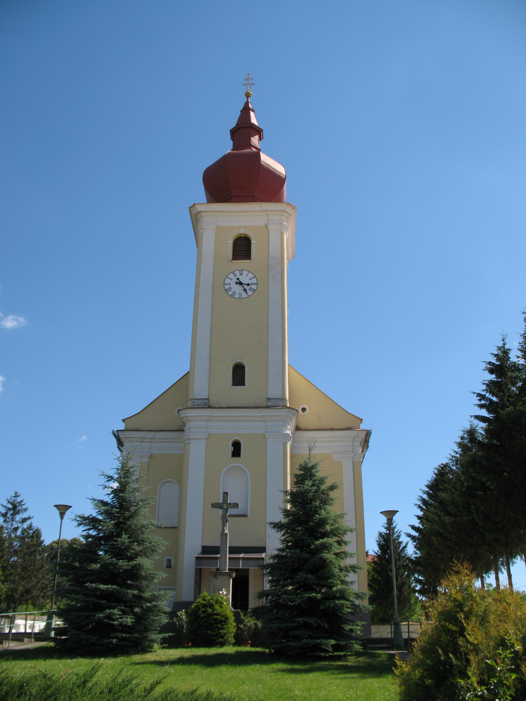 Üreg falu